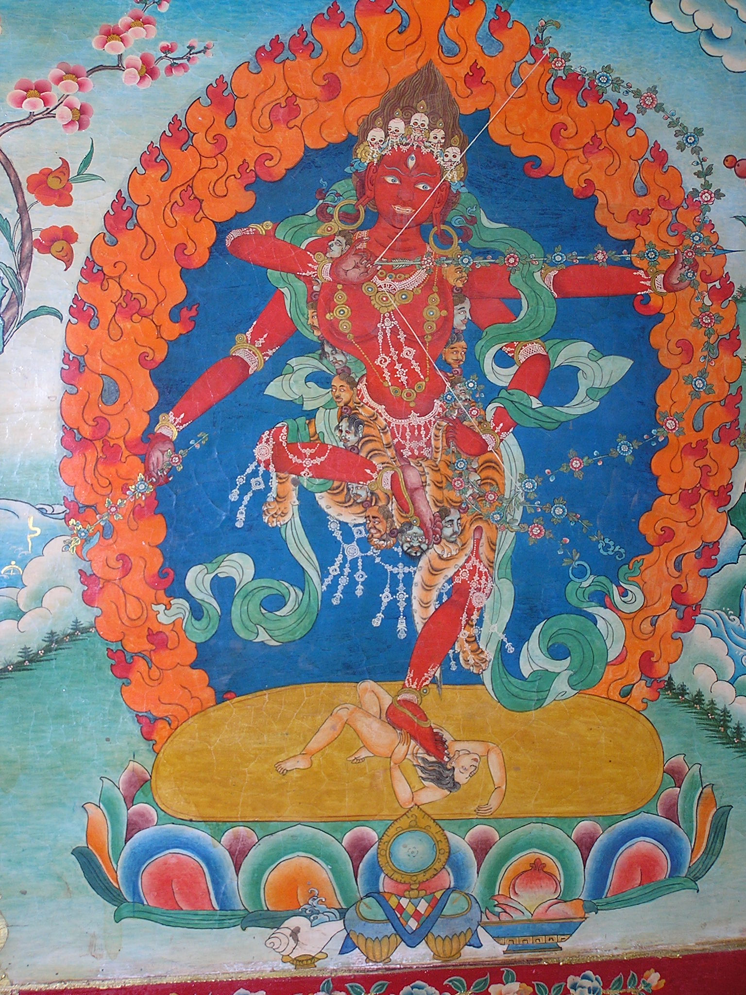 Samye 16.